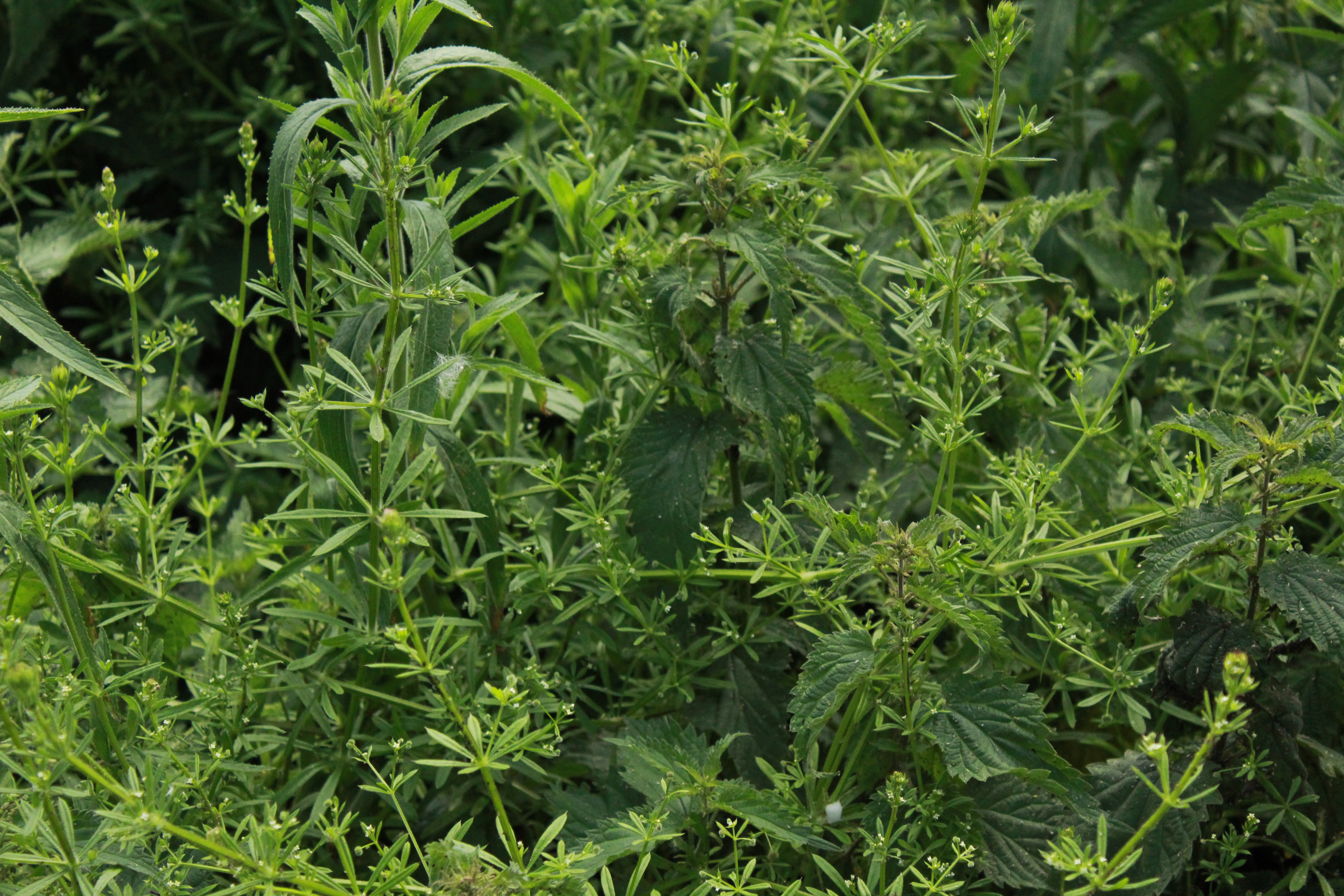 Naast de paden groeit onkruid